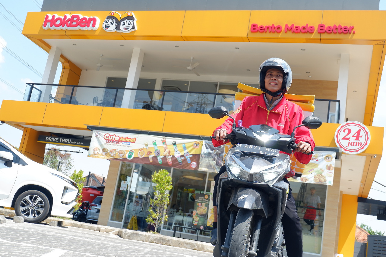 HokBen Majapahit Semarang _ 2